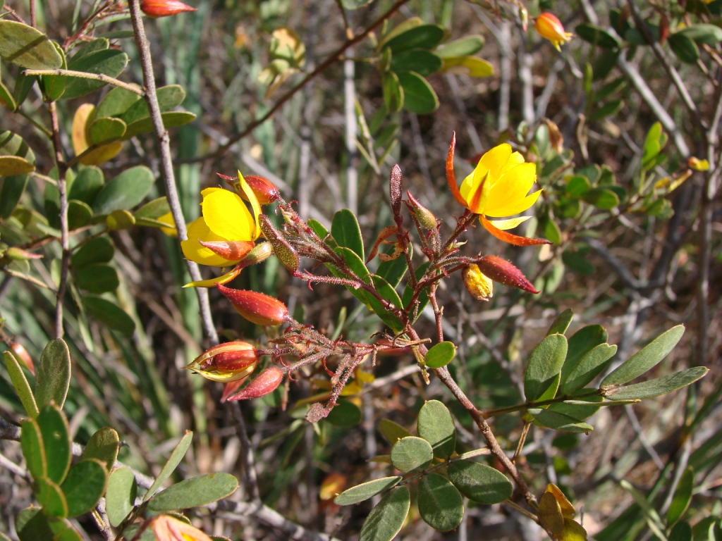 Chamaecrista cathartica var. paucijuga (H.S.Irwin & Barneby) H.S.Irwin & Barneby - FABACEAE - Espécie endêmica de Minas Gerais - Parque Estadual do Biribiri - Serra do Espinhaço - Diamantina - Minas Gerais - Brasil.